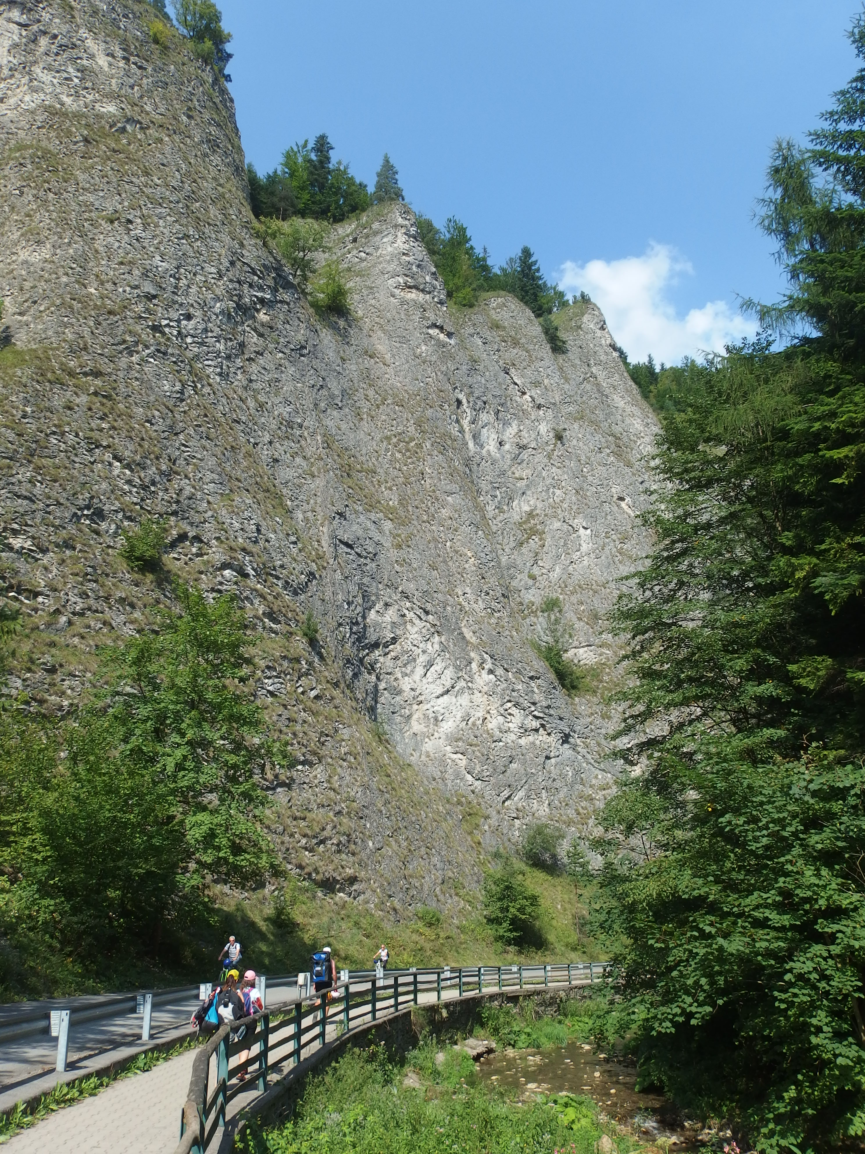 Prielom Lesnického potoka